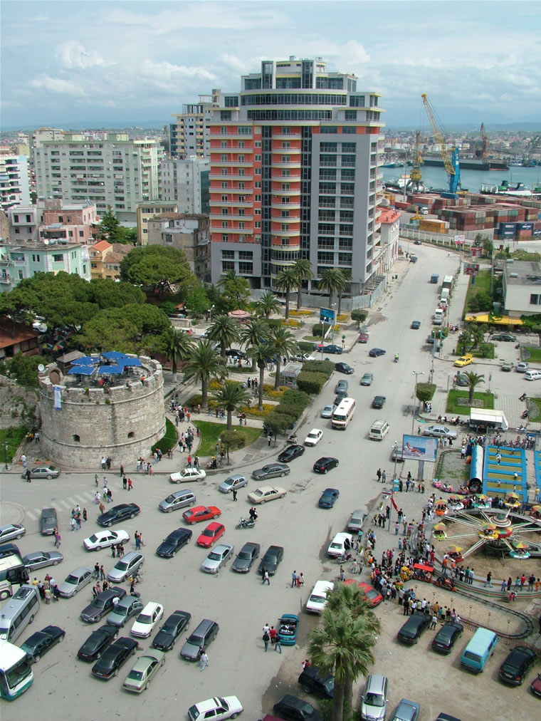 Benátská věž v centru Drače, u místního přístavu